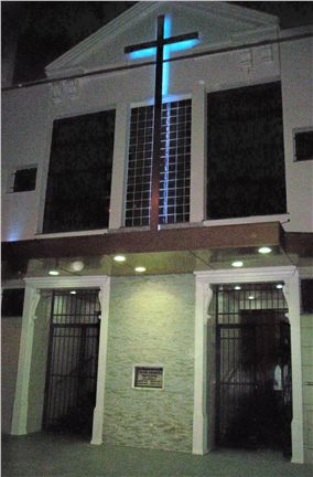 Iglesia Evangelica Pentecostal en Avellaneda Gerli, Argentina.